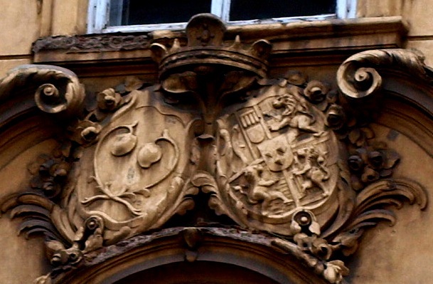 Kaunický palác, erb